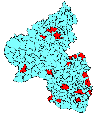 Städte und Verbandsgemeinden, Rheinland-Pfalz Rot: Kreisfreie Städte und große kreisangehörige Städte Blau: Verbandsfreie Städte/Gemeinden und Verbandsgemeinden Kreisfreie Städte: Frankenthal (Pfalz), Kaiserslautern, Koblenz, Landau in der Pfalz, Ludwigshafen am Rhein, Mainz, Neustadt an der Weinstraße, Pirmasens, Speyer, Trier, Worms, Zweibrücken. Große kreisangehörige Städte: Andernach, Bad Kreuznach, Bingen am Rhein, Idar-Oberstein, Ingelheim am Rhein, Lahnstein, Mayen, Neuwied.